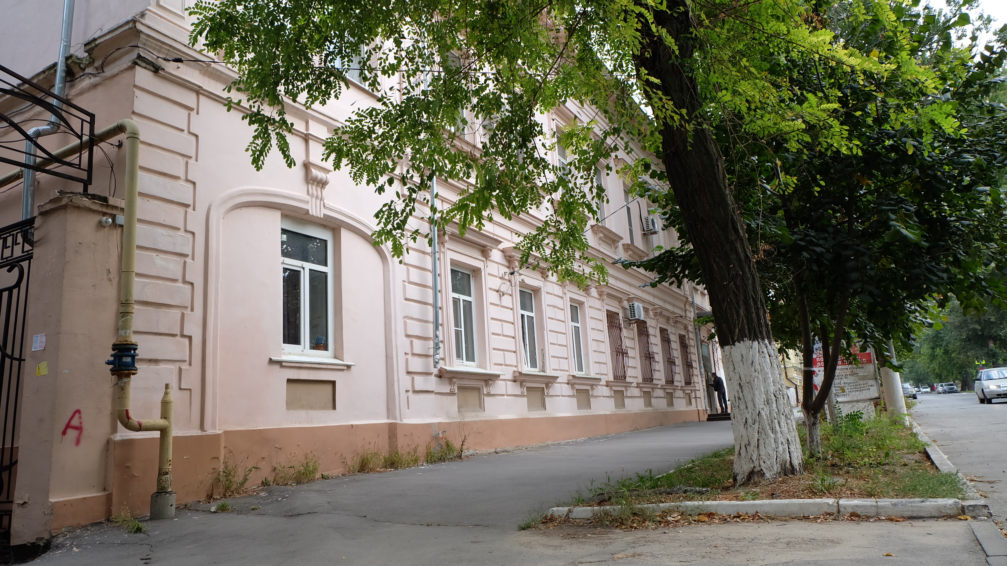 Жилой дом, комплекс застройки улицы: улица Греческая, 86, Таганрог, Ростовская область